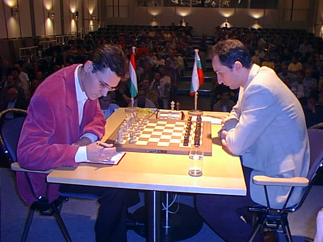 Peter Leko (Ungarn) - Weselin Topalow (Bulgarien), 3. Finalrunde beim WM-Kandidatenfinale 2002 im Kongresszentrum der Dortmunder Westfalenhallen.